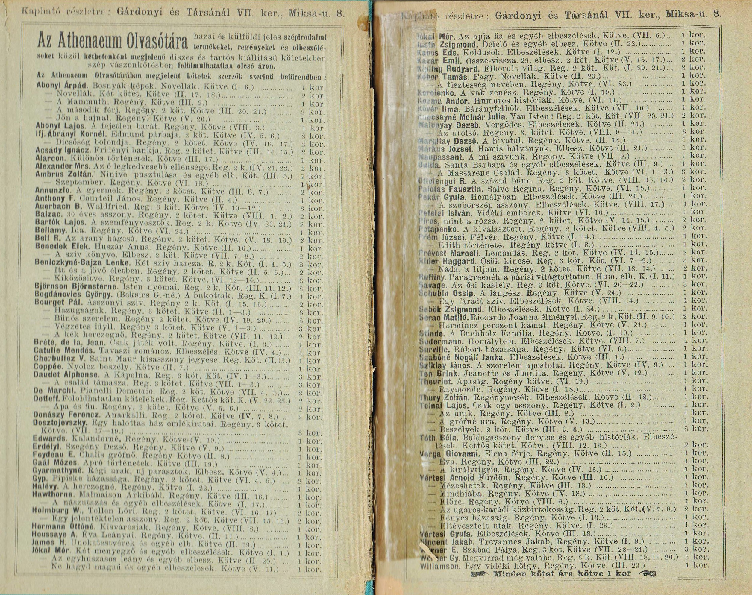 Athenaeum olvasótára-könyvsorozat hirdetése